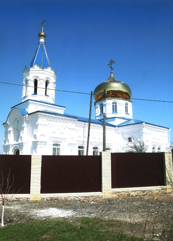 Храм построен в 1905 году. Освящен Александро-Грушевским благочинным протоиреем Василием (Поповым) 23 мая 1906 года.